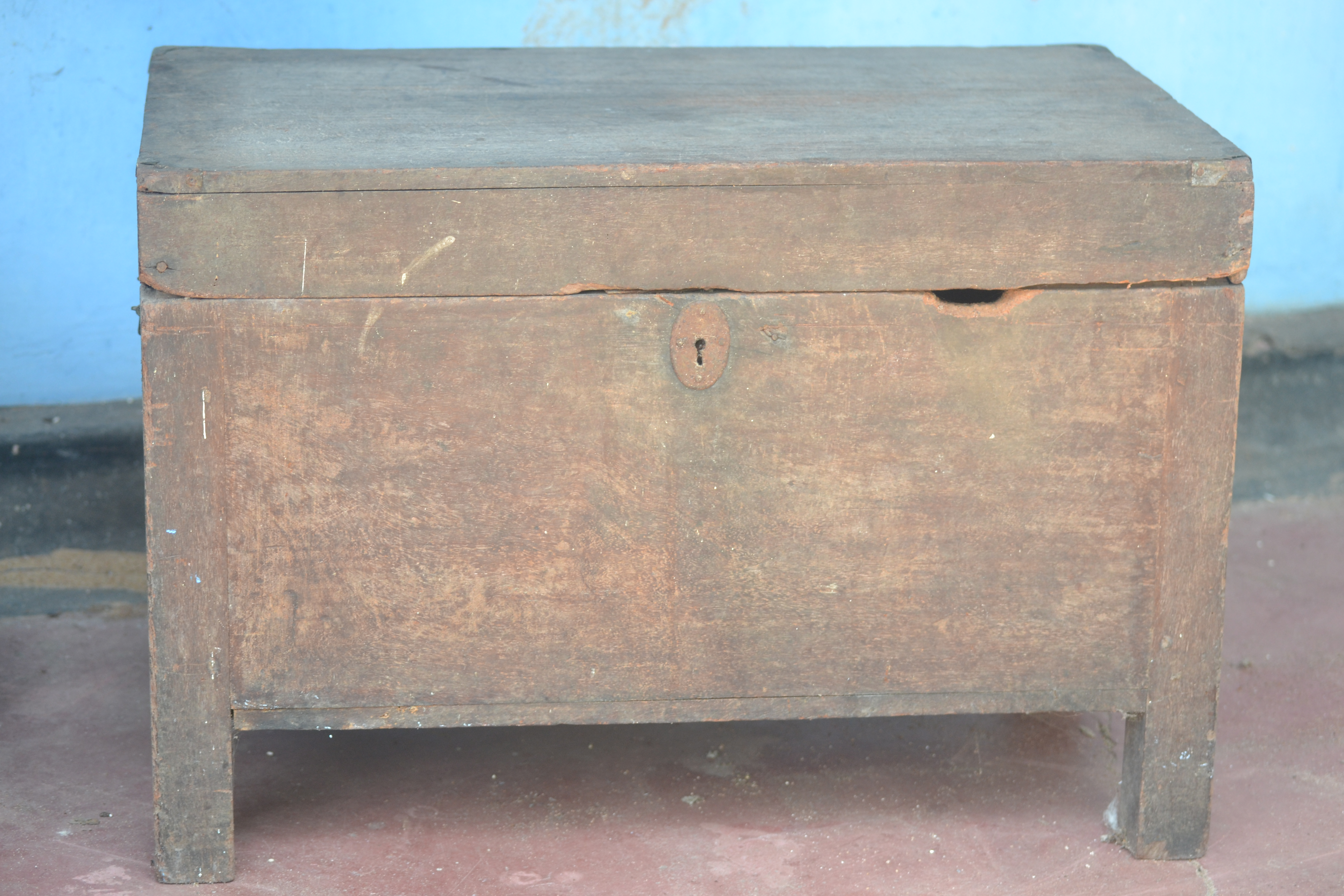 കാൽപ്പെട്ടിയുടെ ചിത്രം